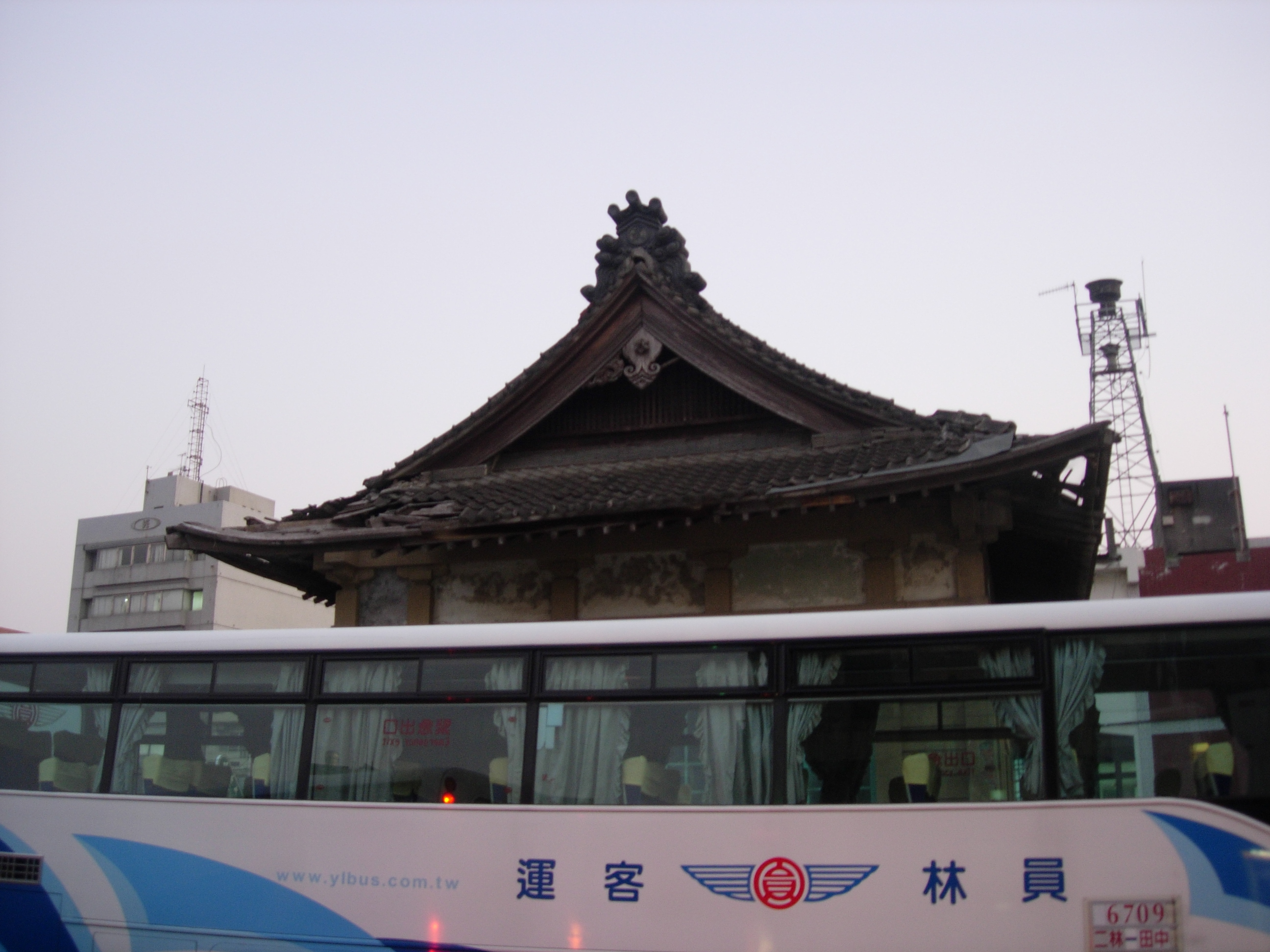 中文（台灣）: 員林客運二林站一景